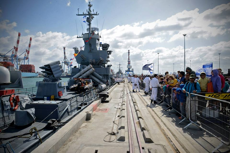 אח"י יפו באשדוד בחגיגות יום העצמאות 2015